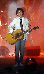 Coti performing in Málaga, Málaga, Spain